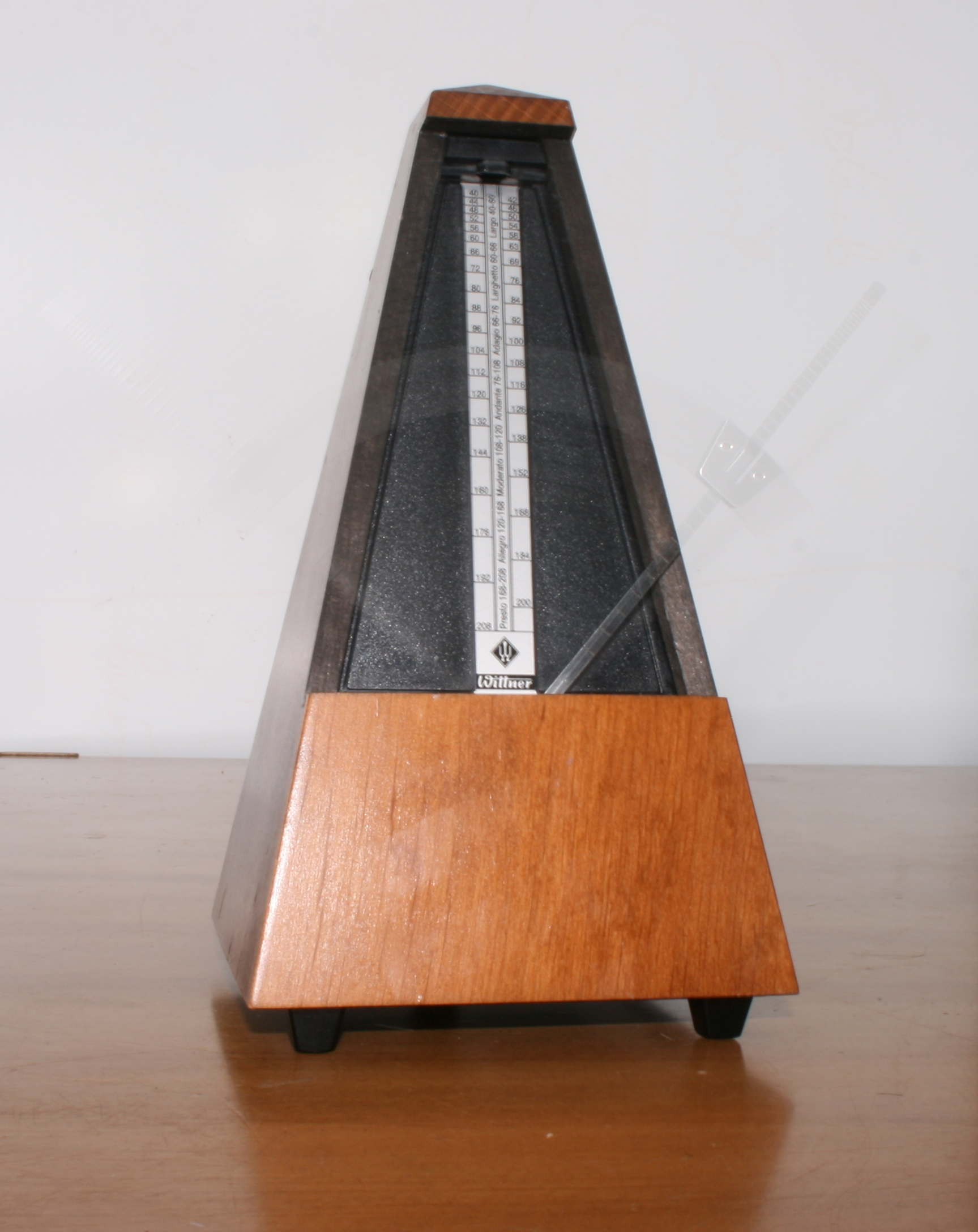 A Metronome, made in .